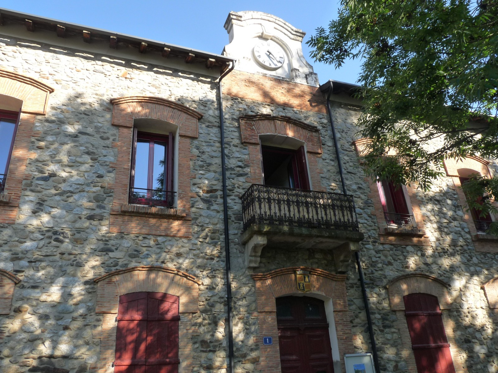 Ecole de Latour-de-Carol, Pyrénées-Orientales, France